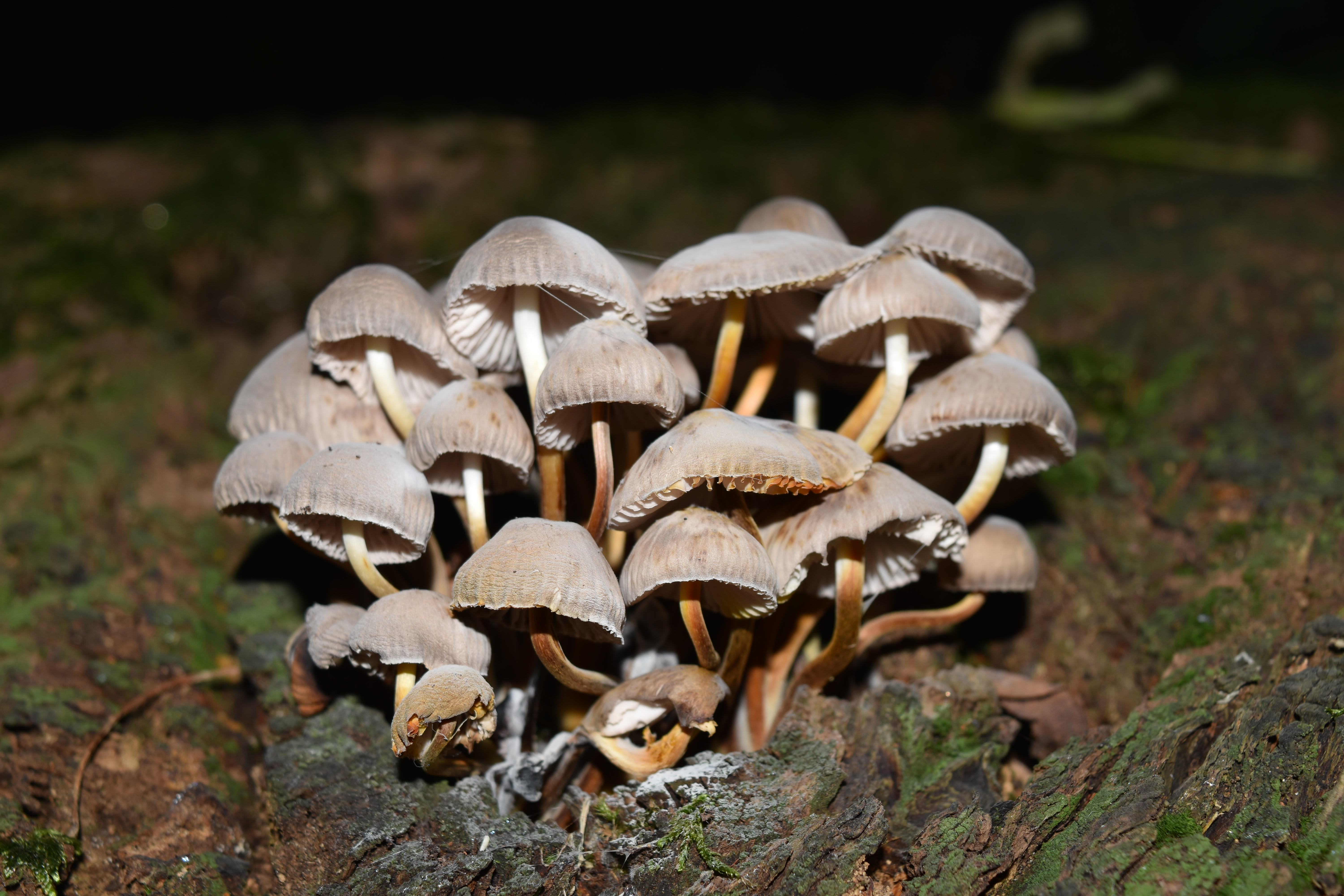 Esemplare di Conocybe rickenii fotografato a Vittorio Veneto (TV) - Italia.